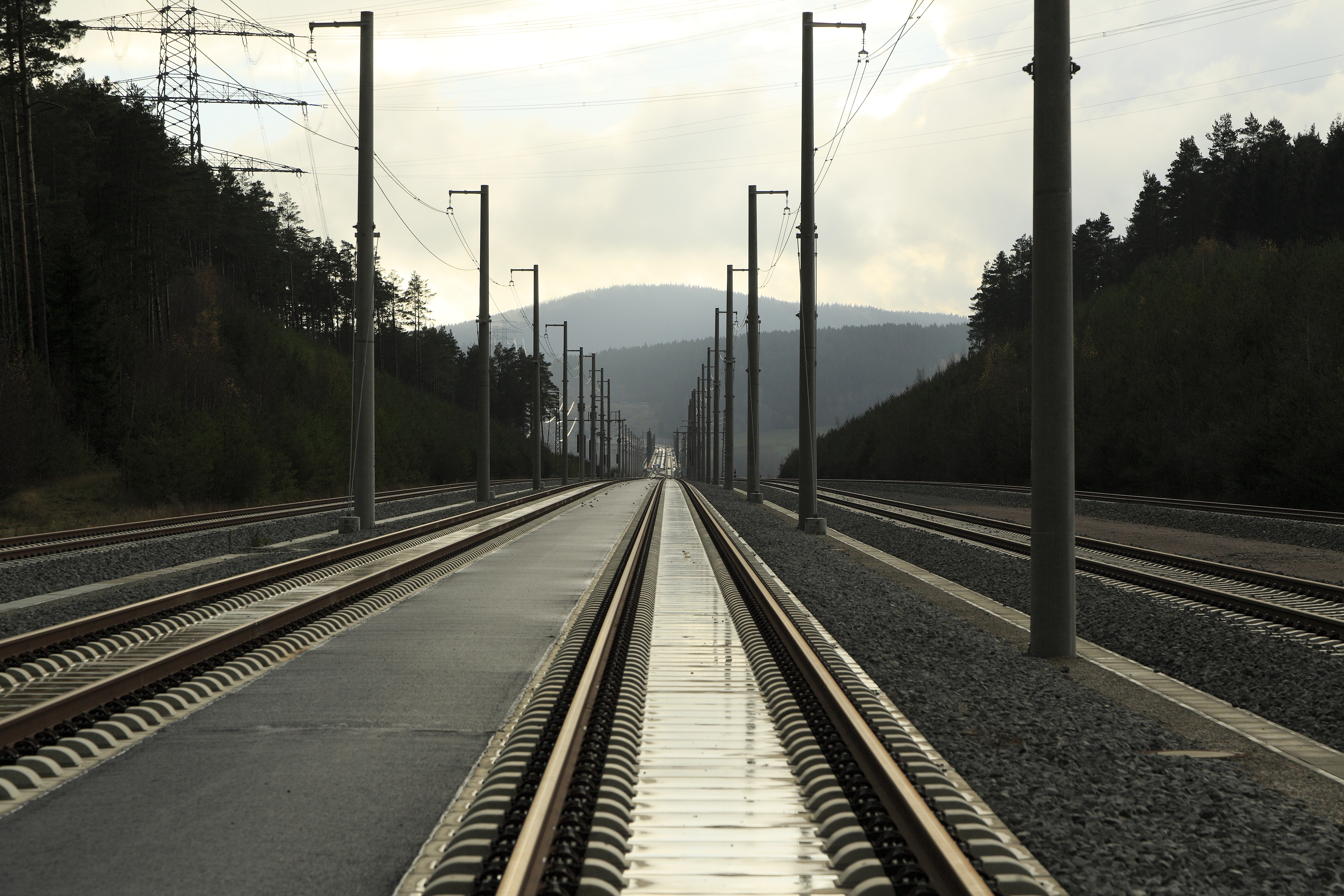 Richtung Süden (Üst Massetal), die Gleise mit der festen Fahrbahn sind die durchgehenden Hauptgleise. Ganz links außerhalb und rechts zwischen den beiden Randgleisen ist der Raum für den Einbau von Bahnsteigen freigehalten worden.